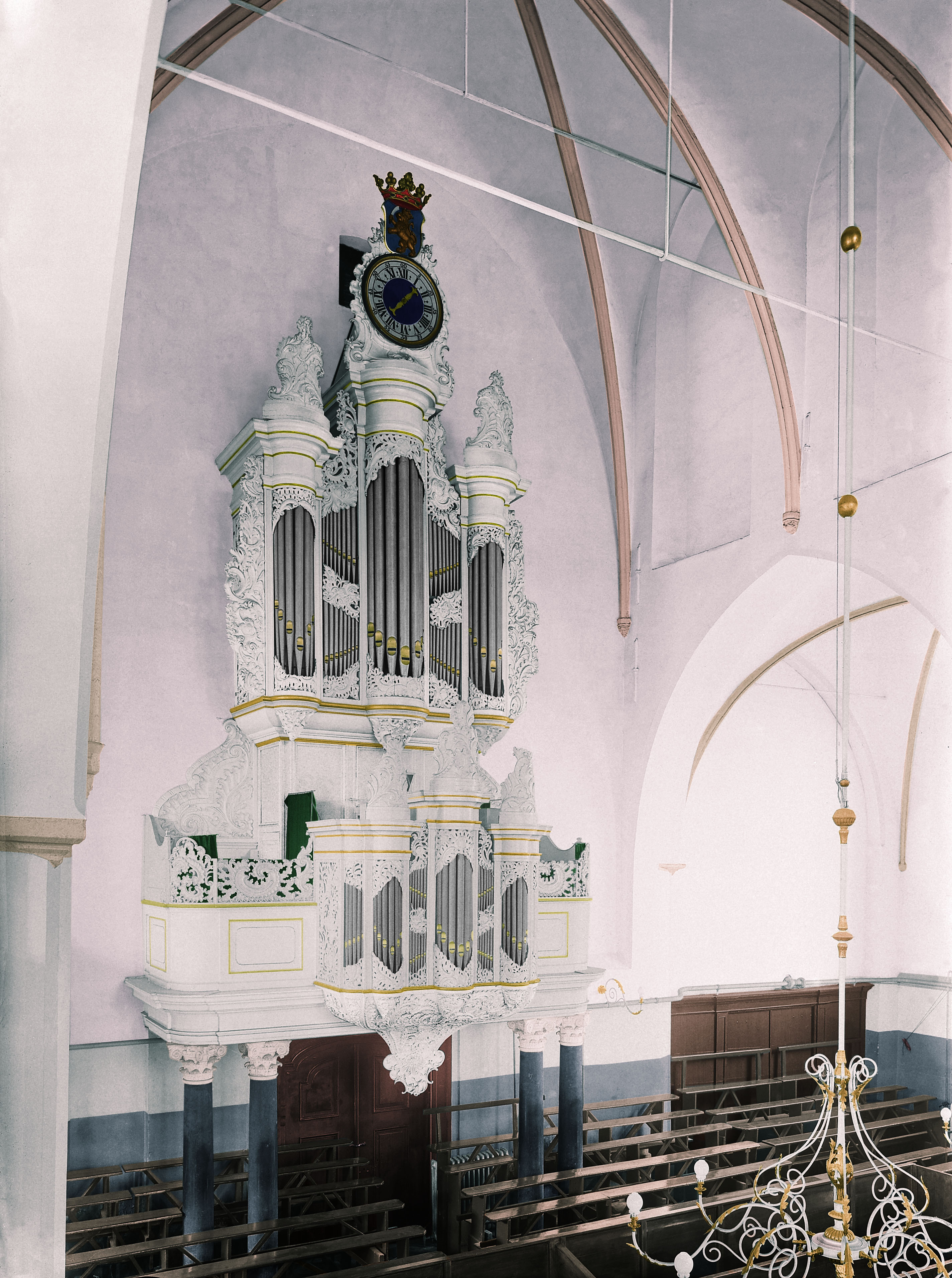 Reconstructie van de wit-gouden kleurstelling van het orgel in Nijkerk gedurende de periode 1846-1937 op basis van een oude zwartwitfoto.